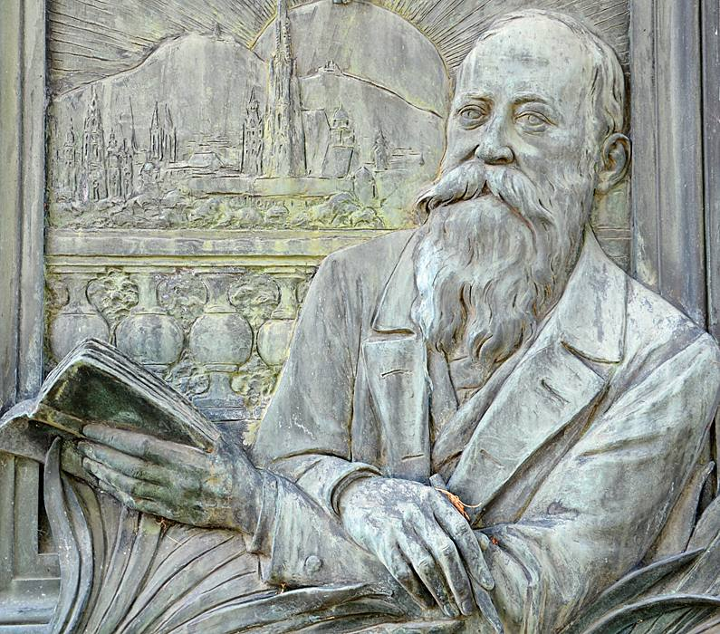 Relief am Grab von Josef Schlesinger auf dem Zentralfriedhof Wien